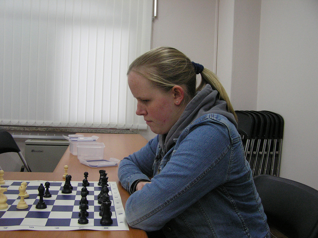 WFM Jessie Gilbert (1987-2006)